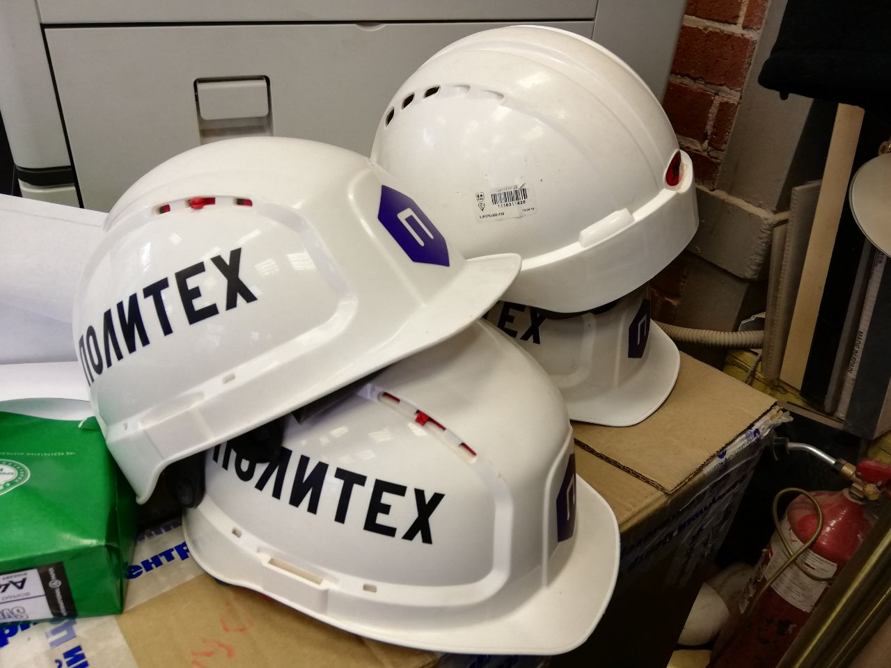 Рабочие каски сотрудников Политеха